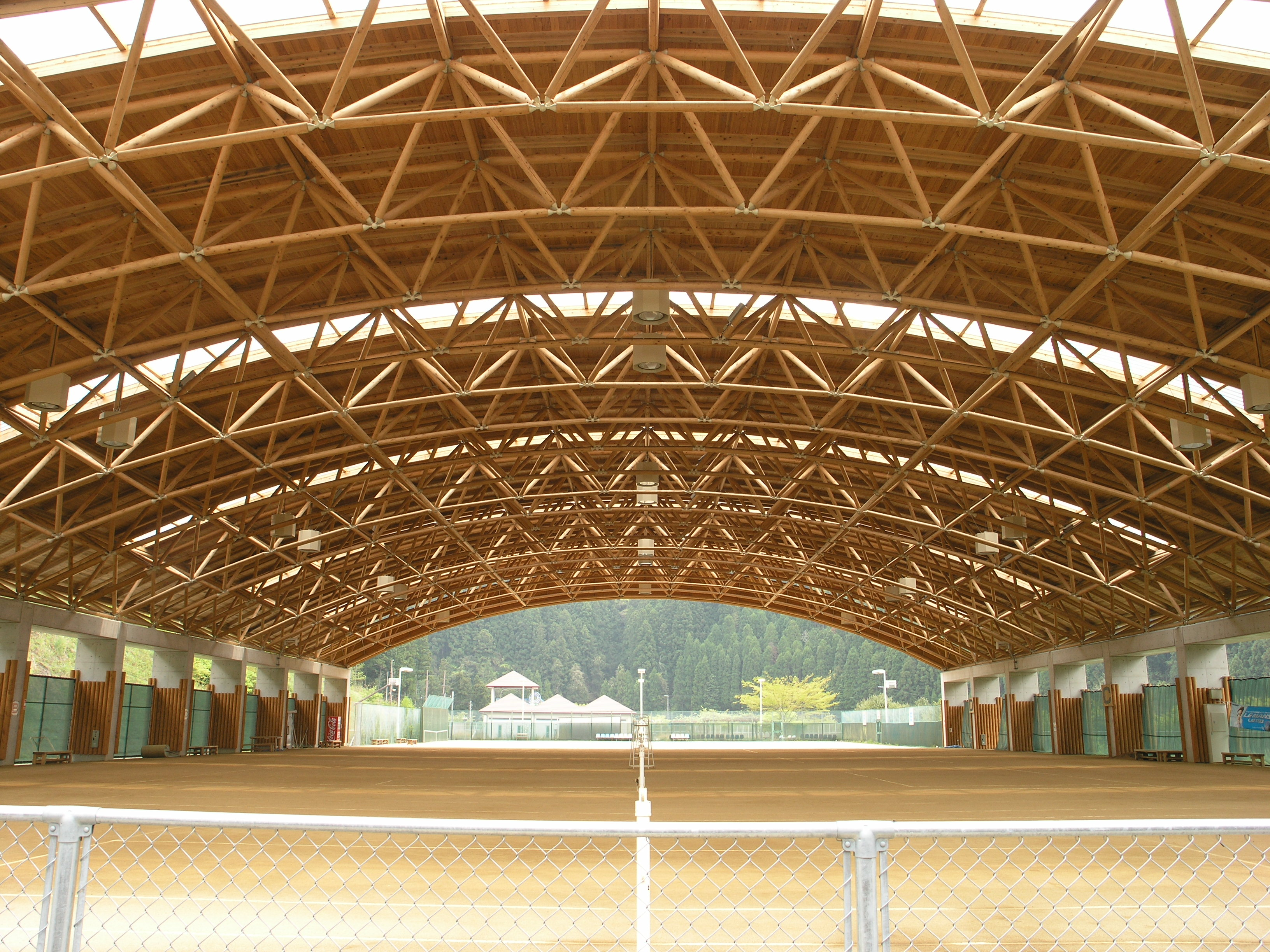 Shimizu_a_Roadside_Station in Wakayama, Japan